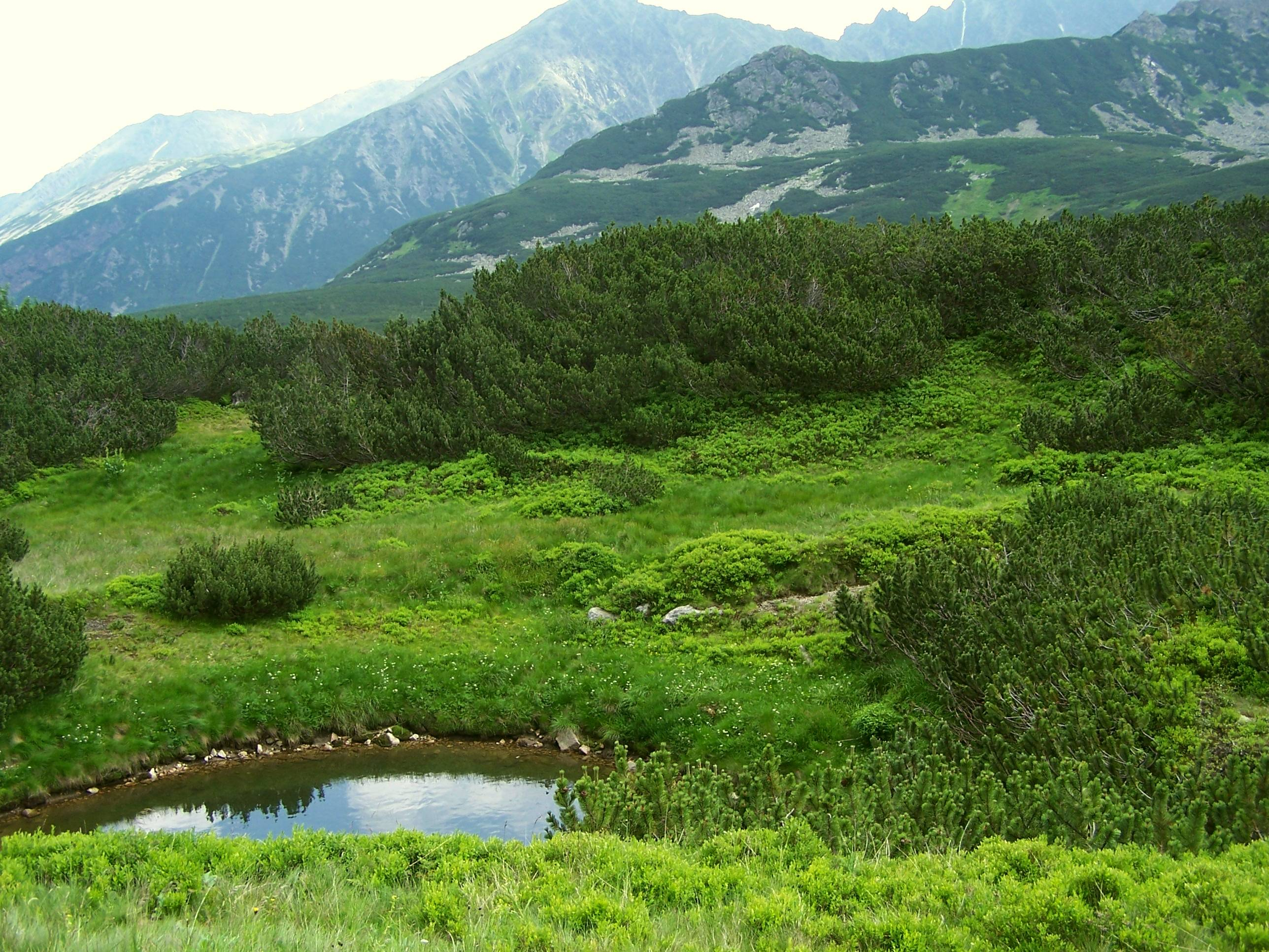 Dolina Gąsienicowa (Tatra Mountains)